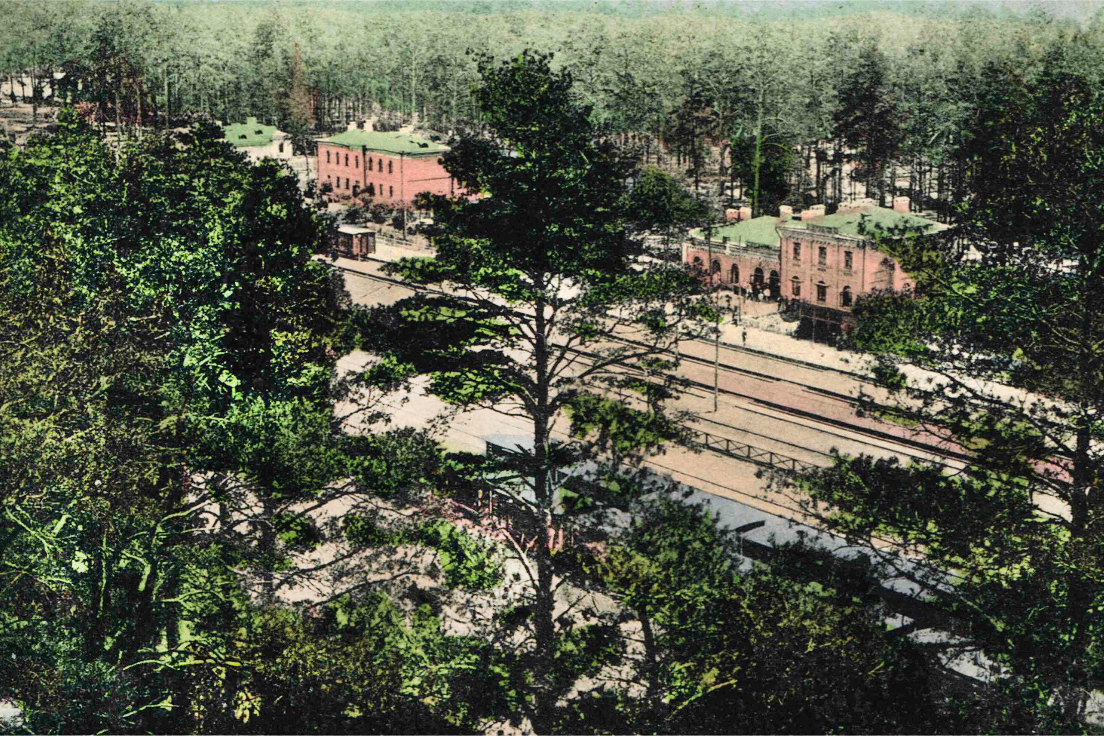 Залізнична станція на Дарниці